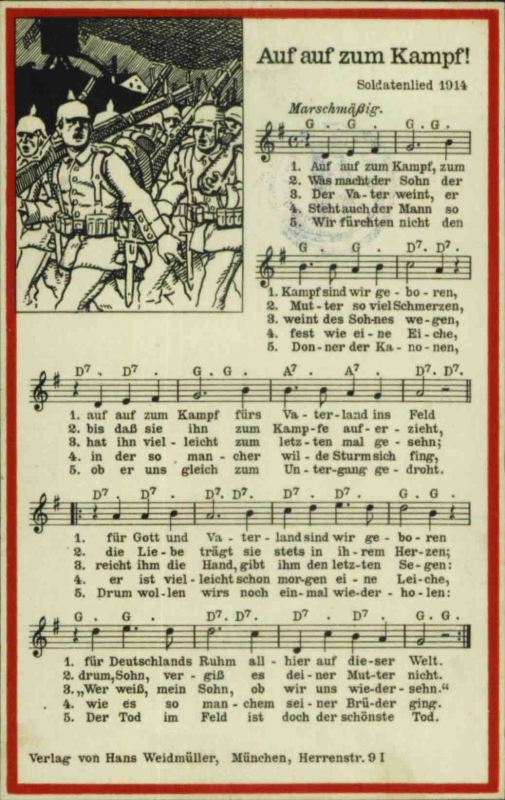 Soldatenlied "Auf auf zum Kampf", Version von 1914